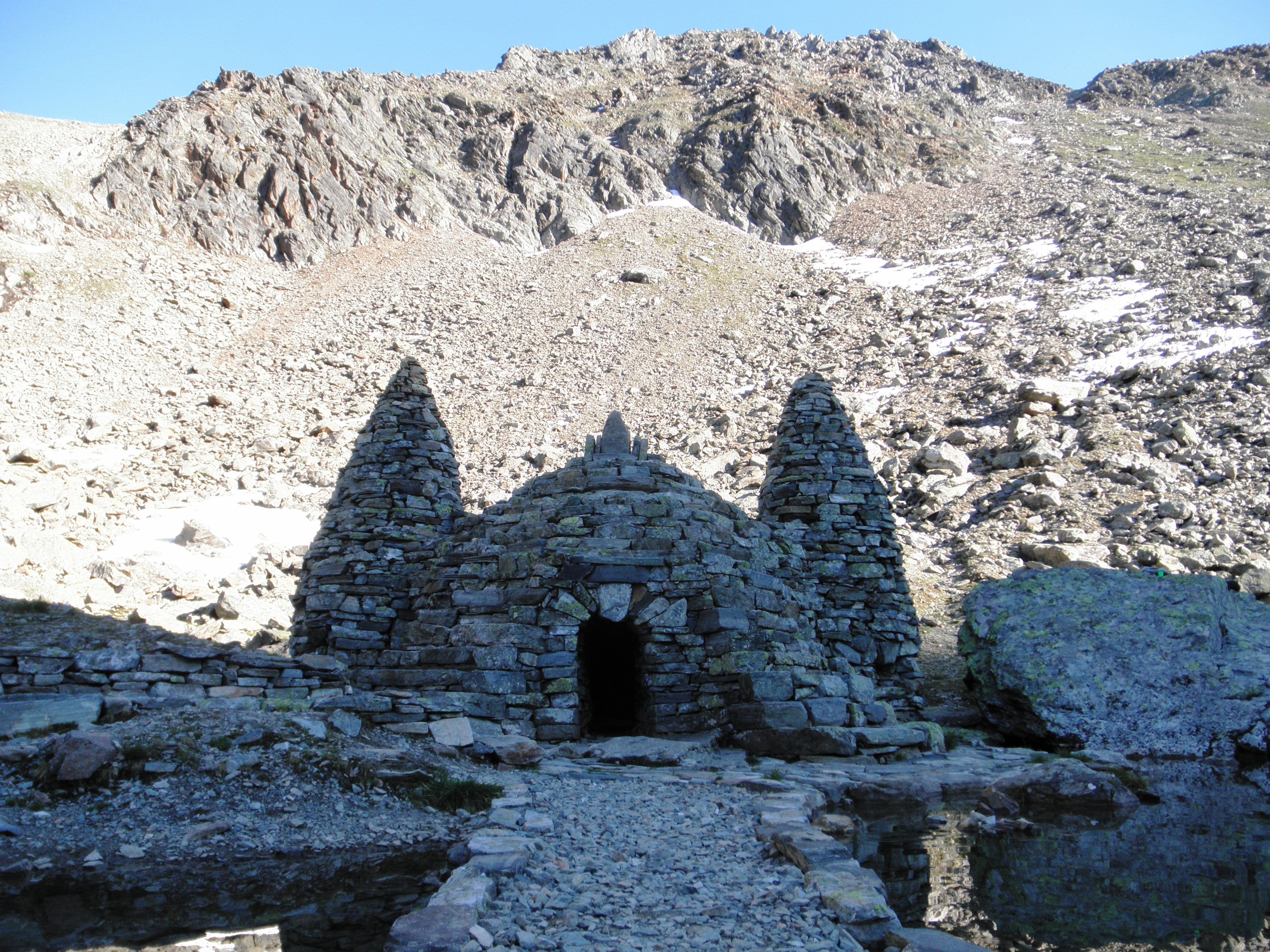 Blick vom Steg auf den Apollontempel am Hundstalsee (Österreich).